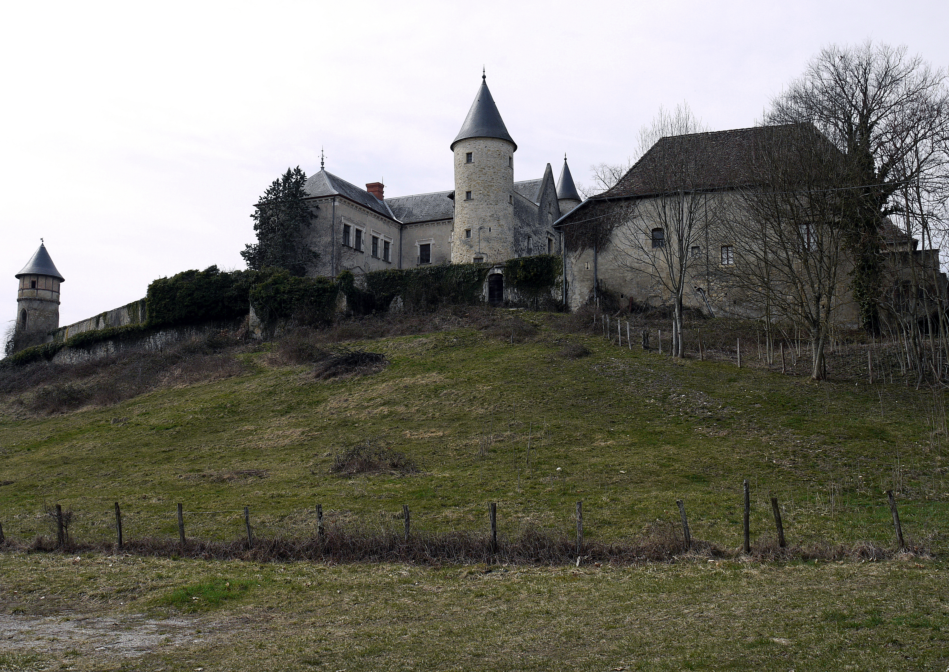 Château d'Andert, (Inscrit, 1990) .